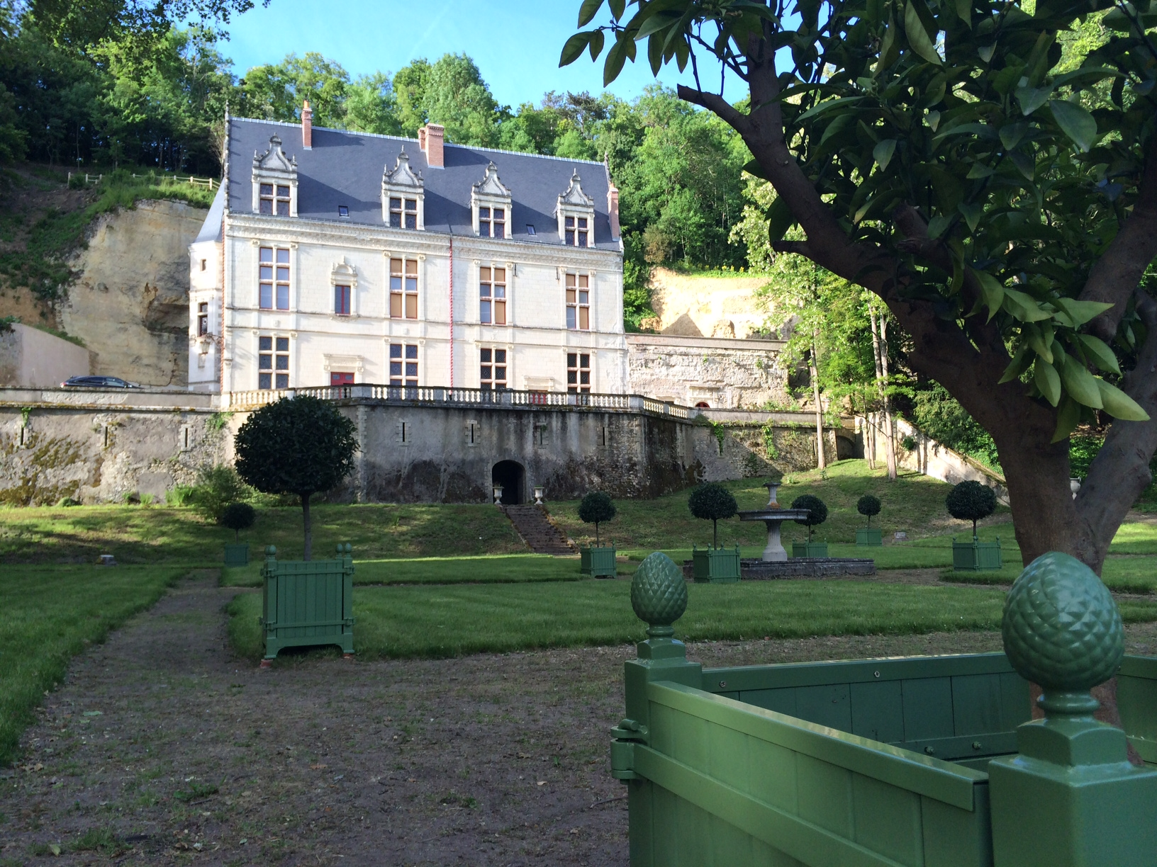 Vue des jardins